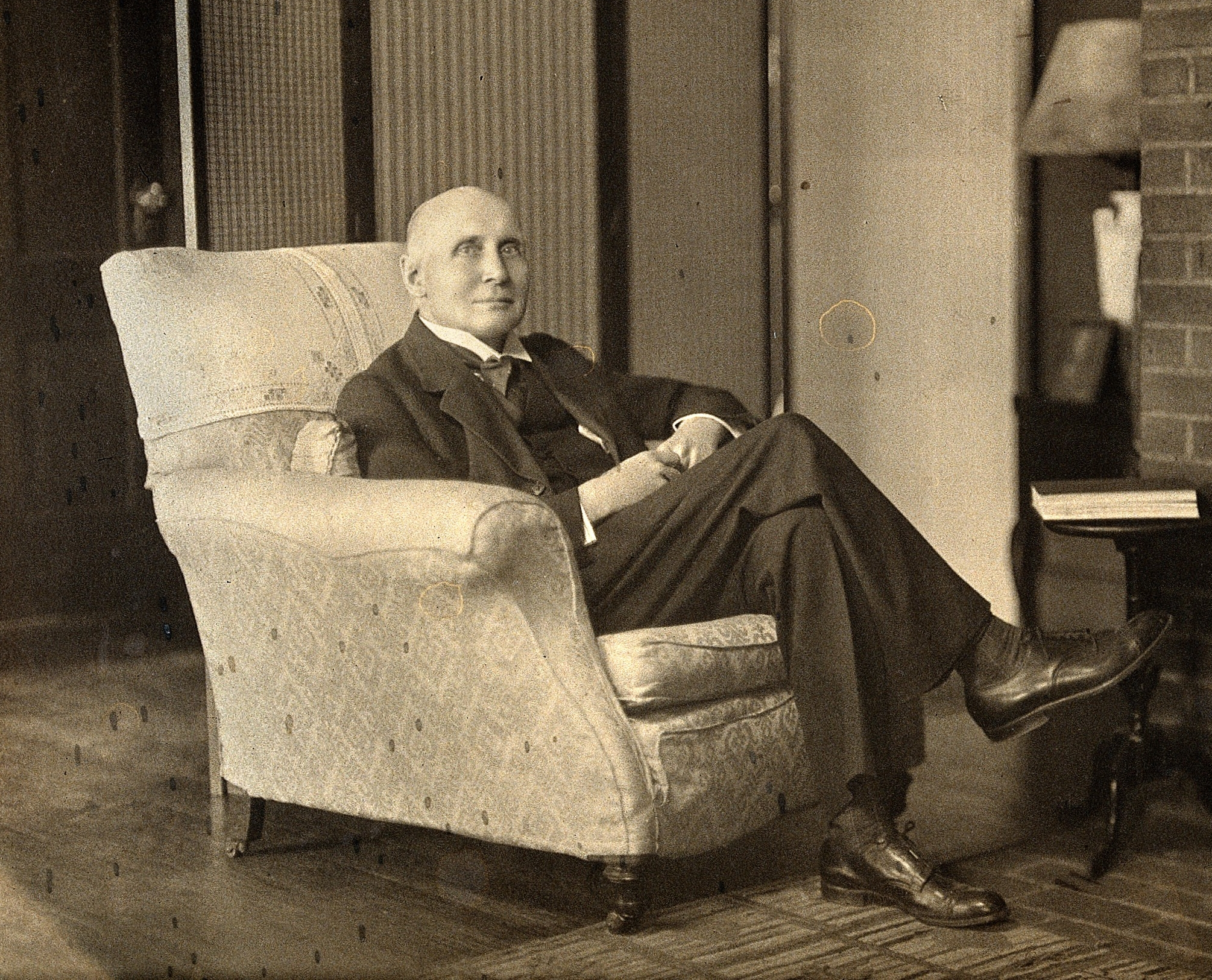 Photographie d'Alfred North Whitehead